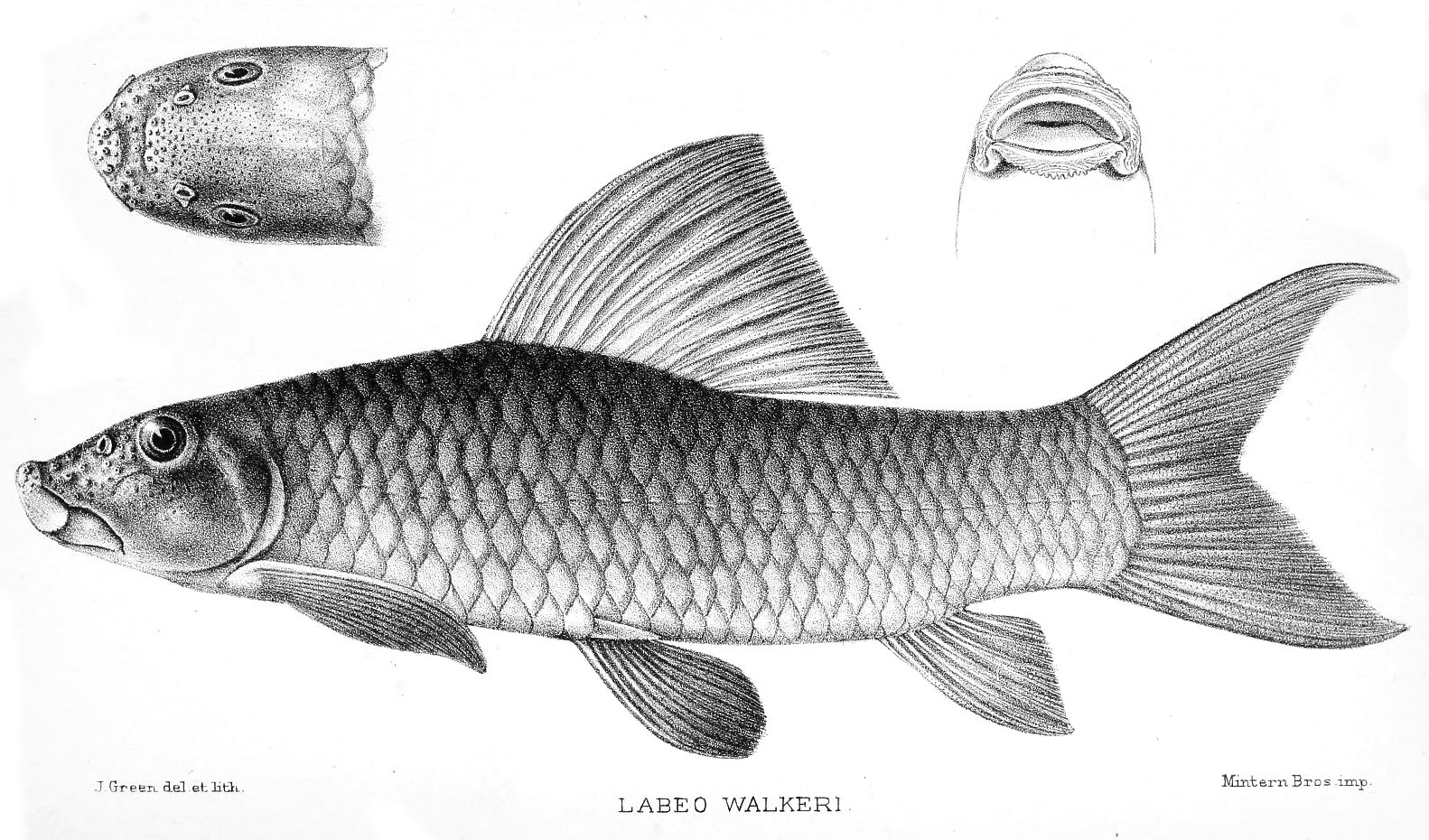 Labeo walkeri= Labeo parvus